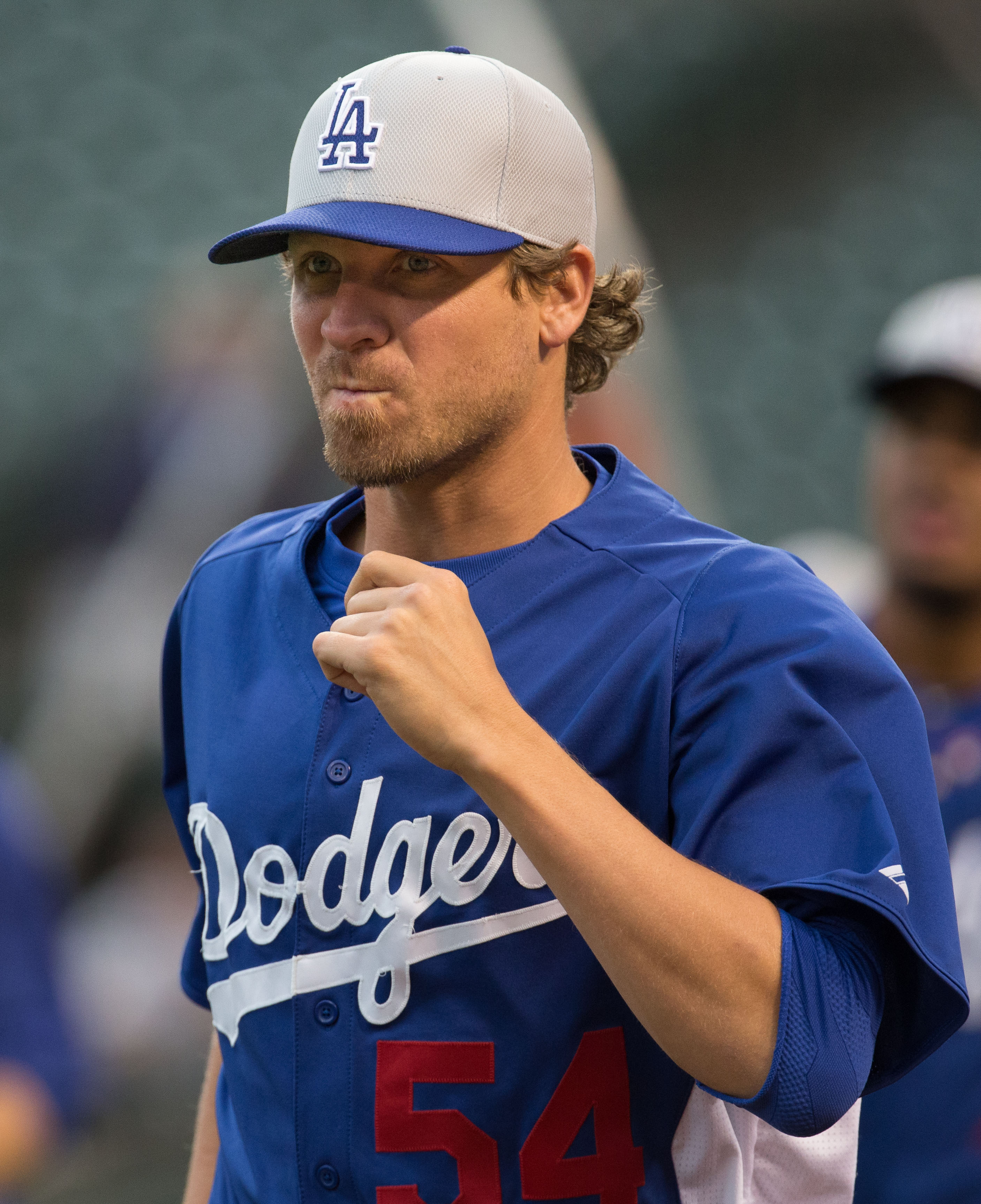 Matt Guerrier